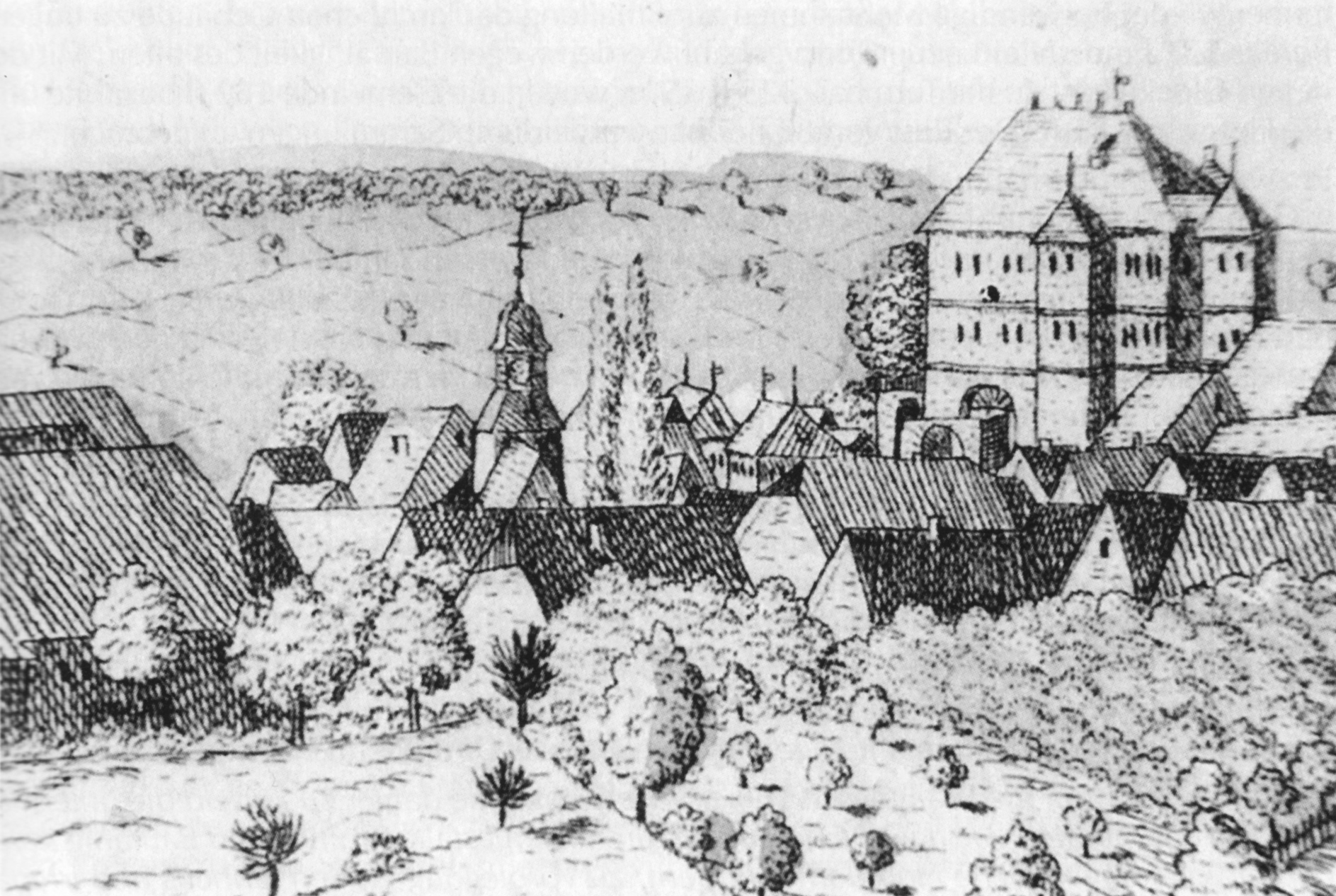 Ortsmitte von Fürfeld um 1820, Ausschnitt aus einer Zeichnung von Christoph Ludwig Yelin